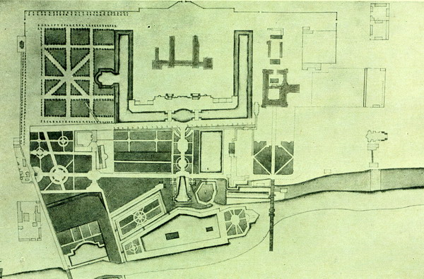 Анненгоф (Генплан резиденції в Москві)